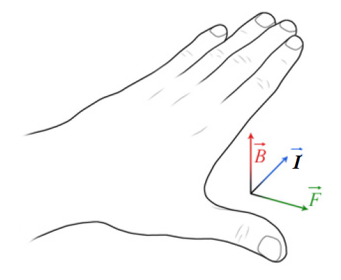 Regula lewej dloni muudetud kujul